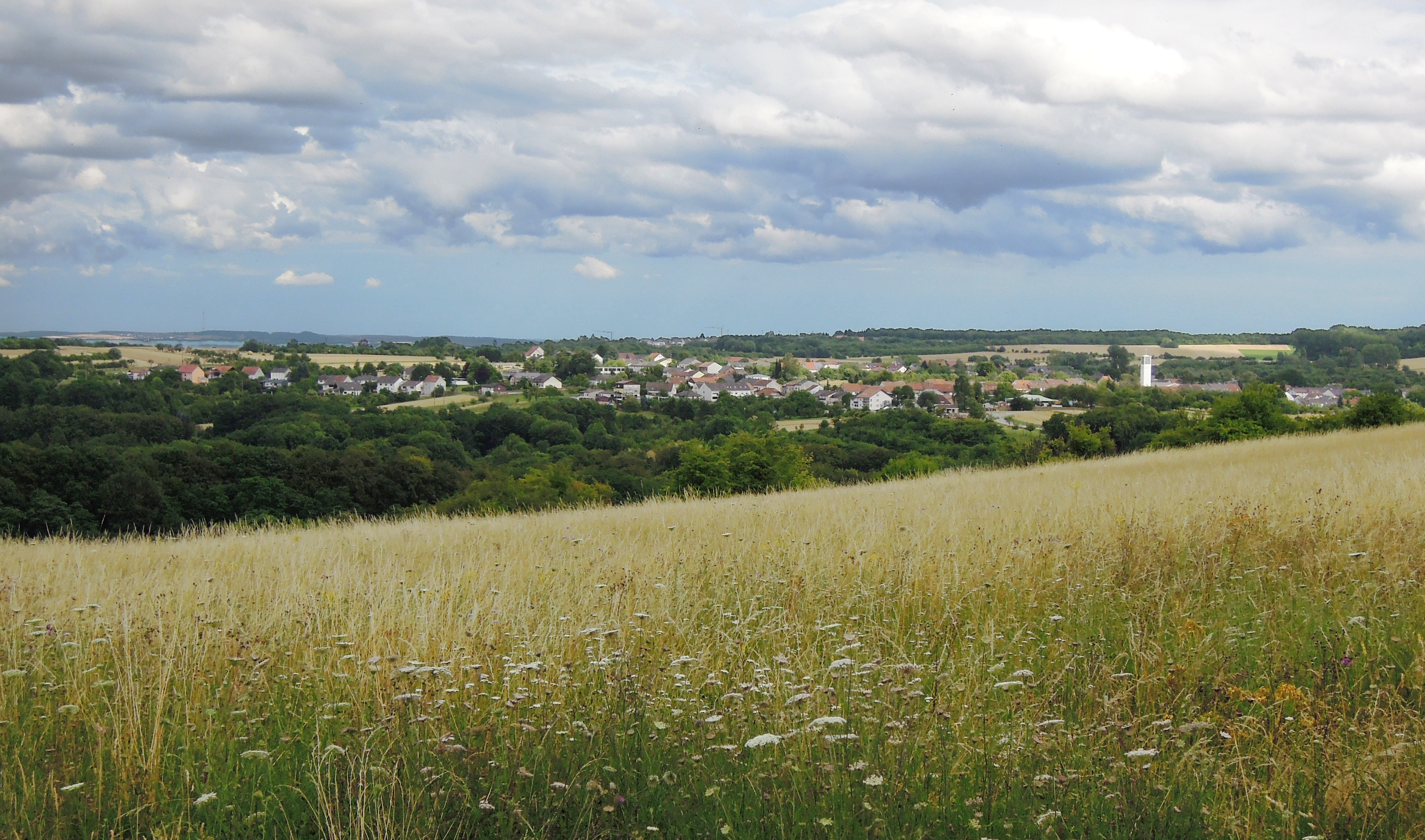 Blick auf Gisingen vom Modellflugplatz